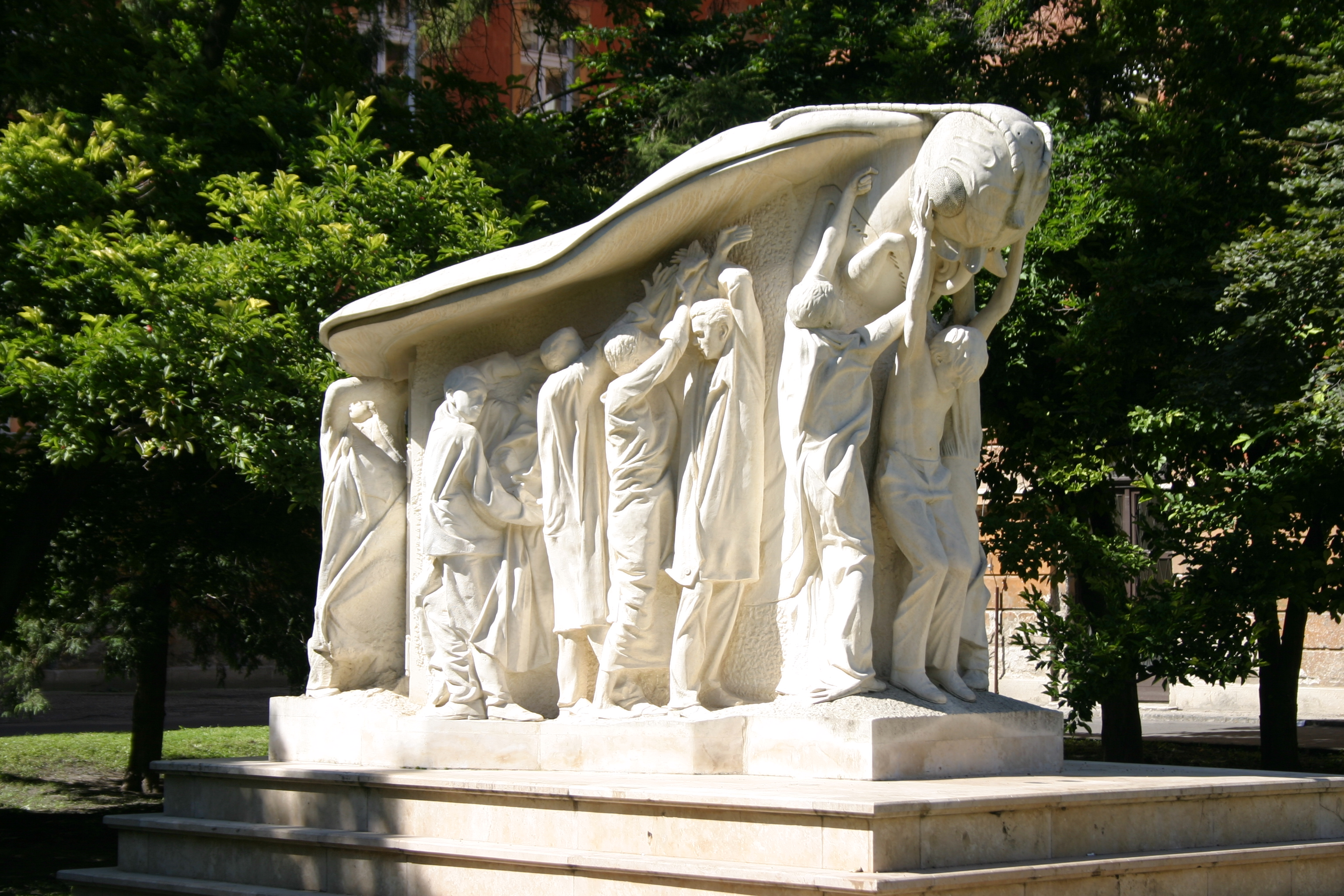 1956-os szobor Szegeden a Rerrich Béla téren (Melocco Miklós alkotása, 1997)